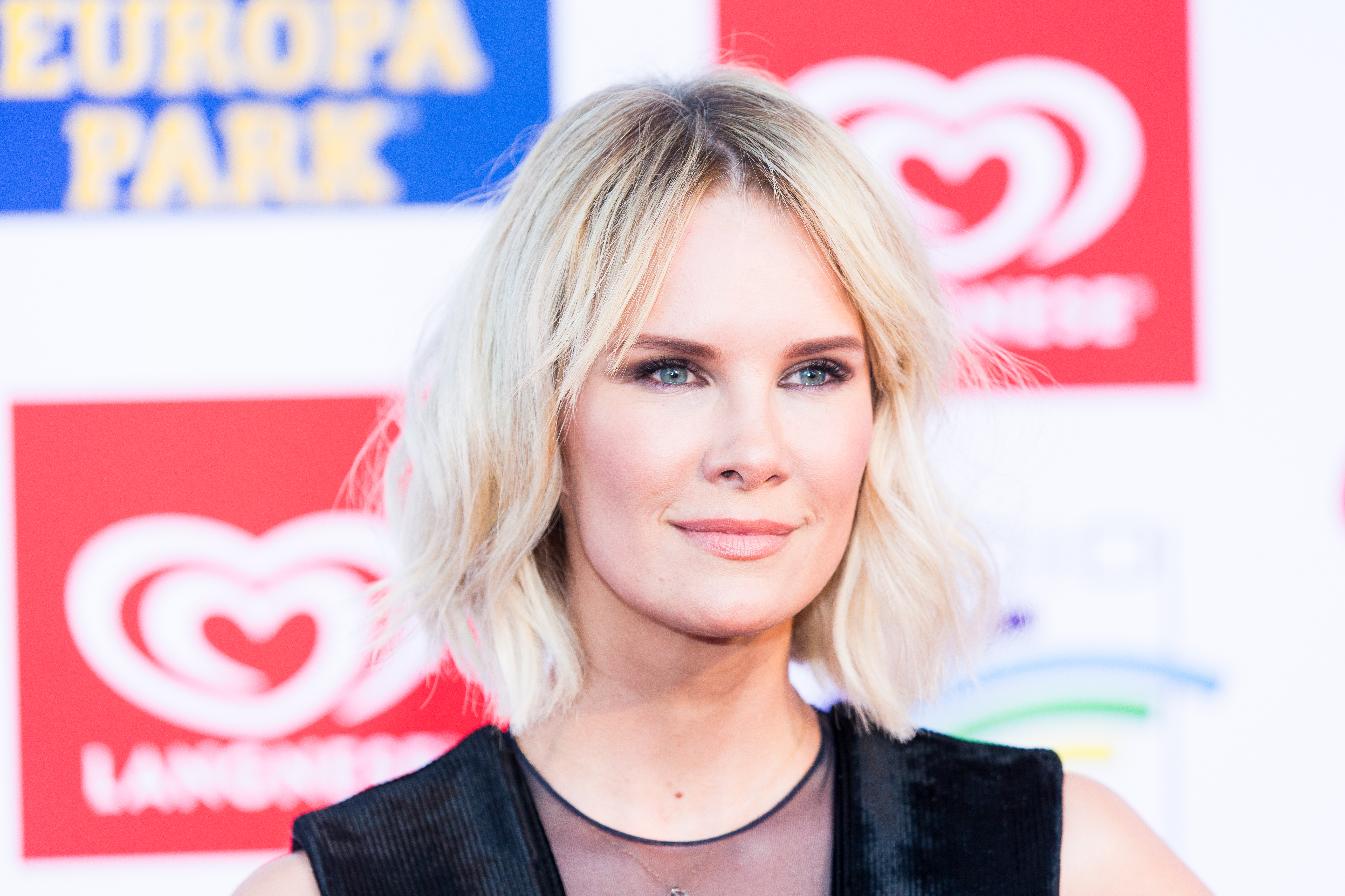 during Radio Regenbogen Award 2017 at Europapark, Rust, Baden-Württemberg, Germany on 2017-04-07, Photo: Sven Mandel